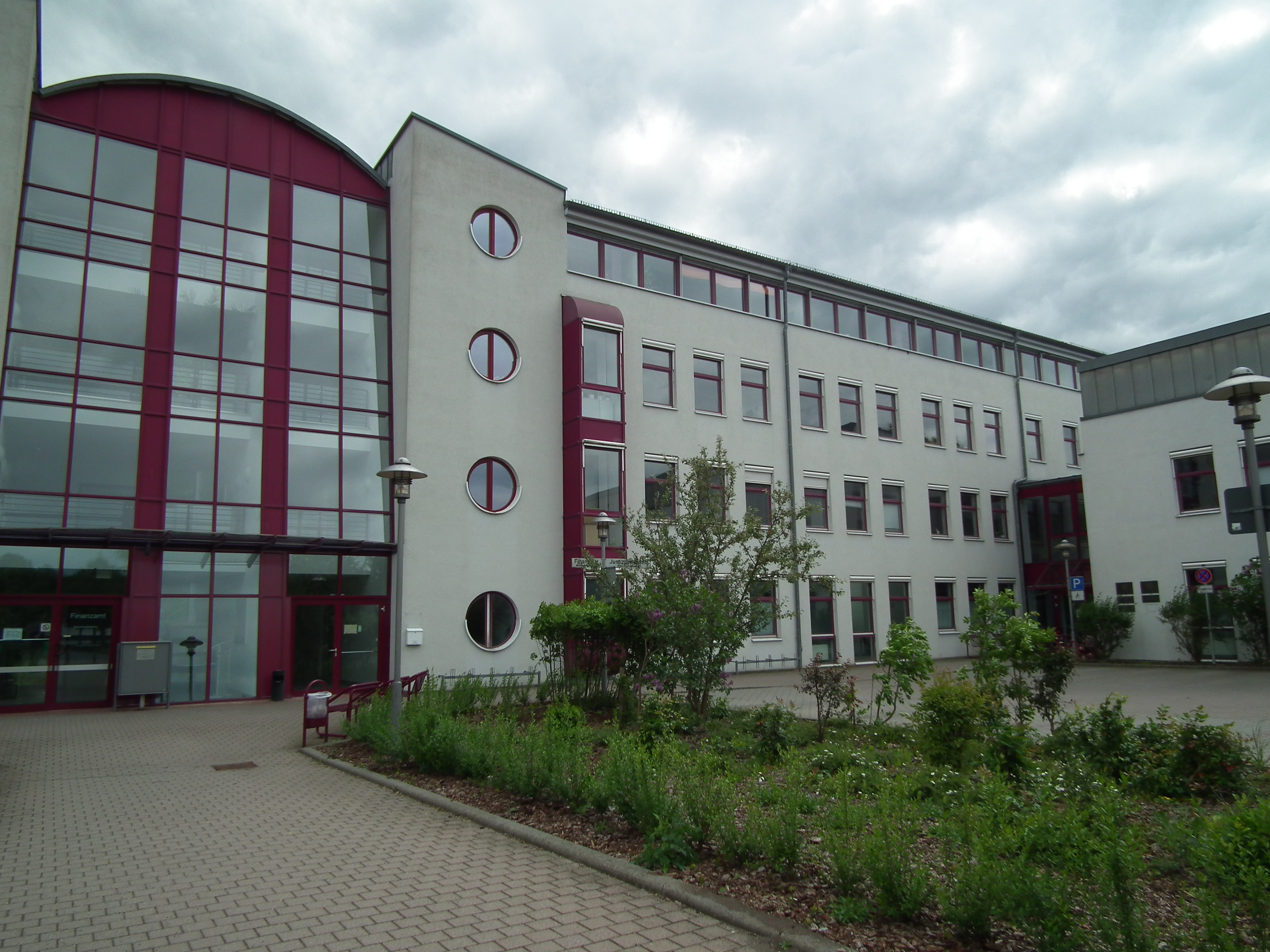 Hoyerswerda